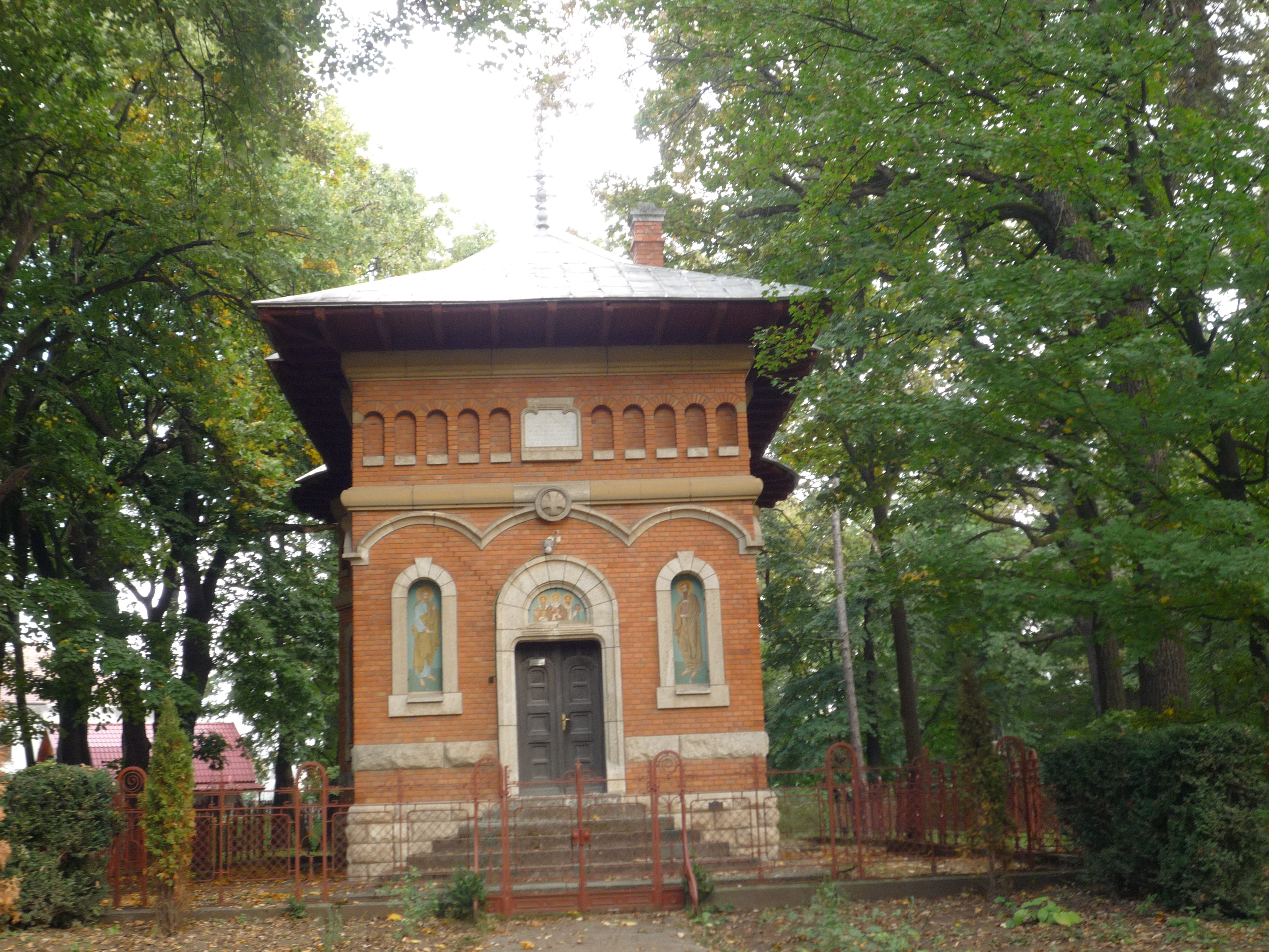 Biserica (Capela Sfintii Trei Ierarhi - Scoala Normală "Vasile Lupu")